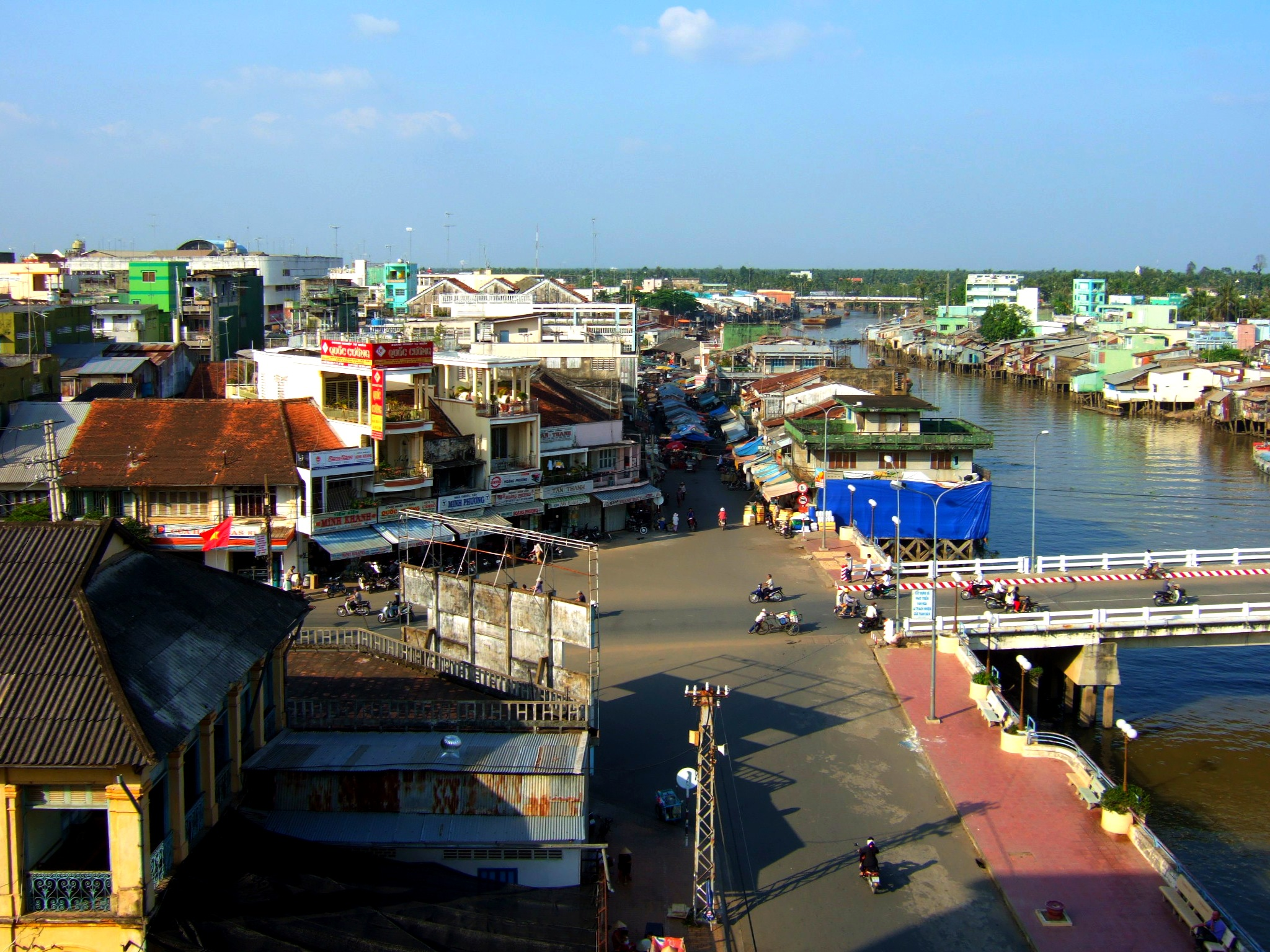 My Tho, Mekong Delta, Vietnam